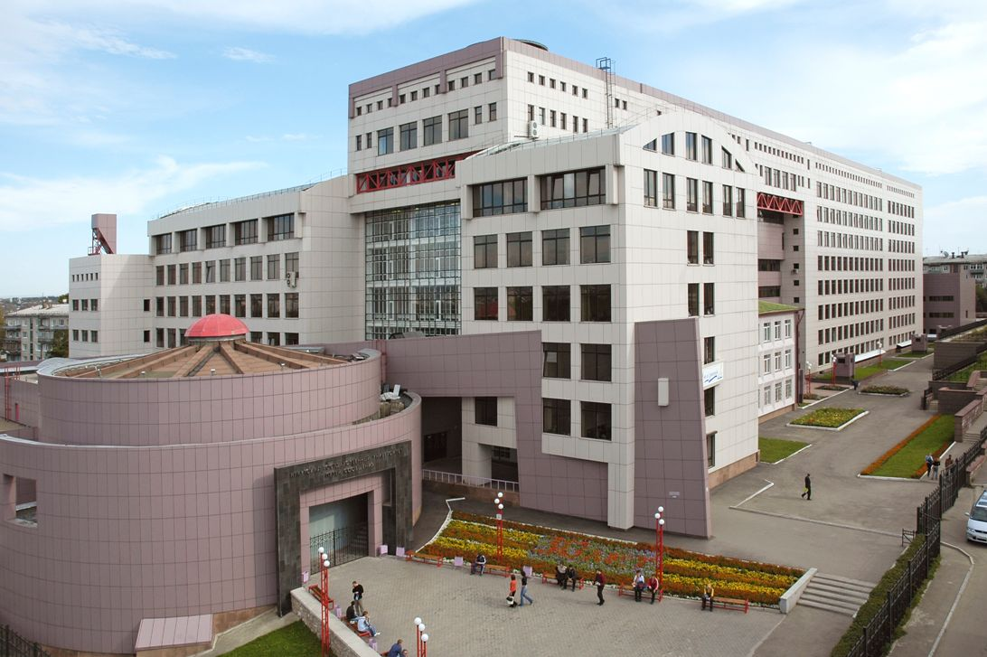 Общий вид на главное здание Иркутского государственного университета путей сообщения